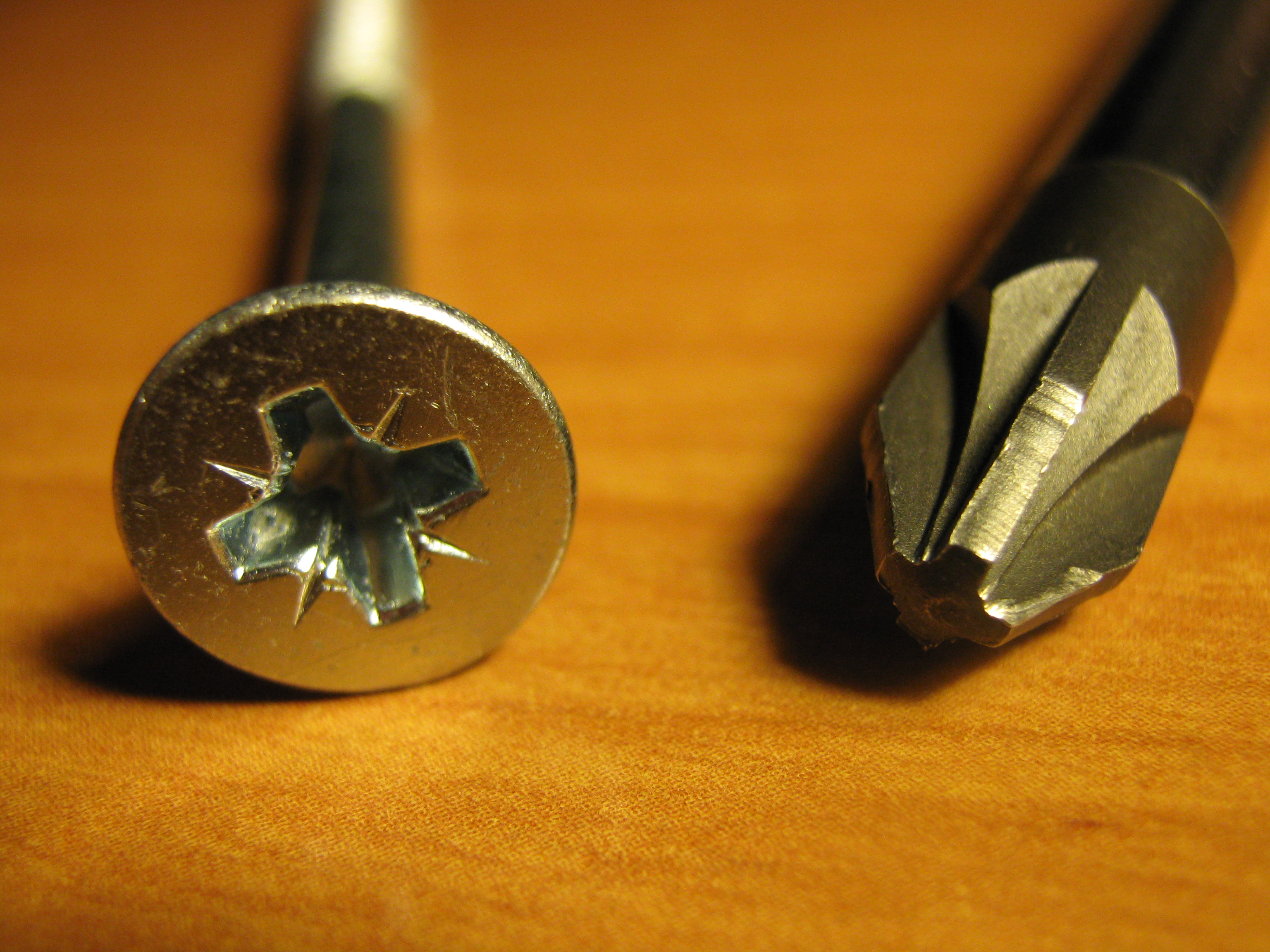 Отвёртка Позидрив с соответствующим крепежом